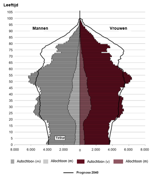 Bevolkingspiramide Tirol